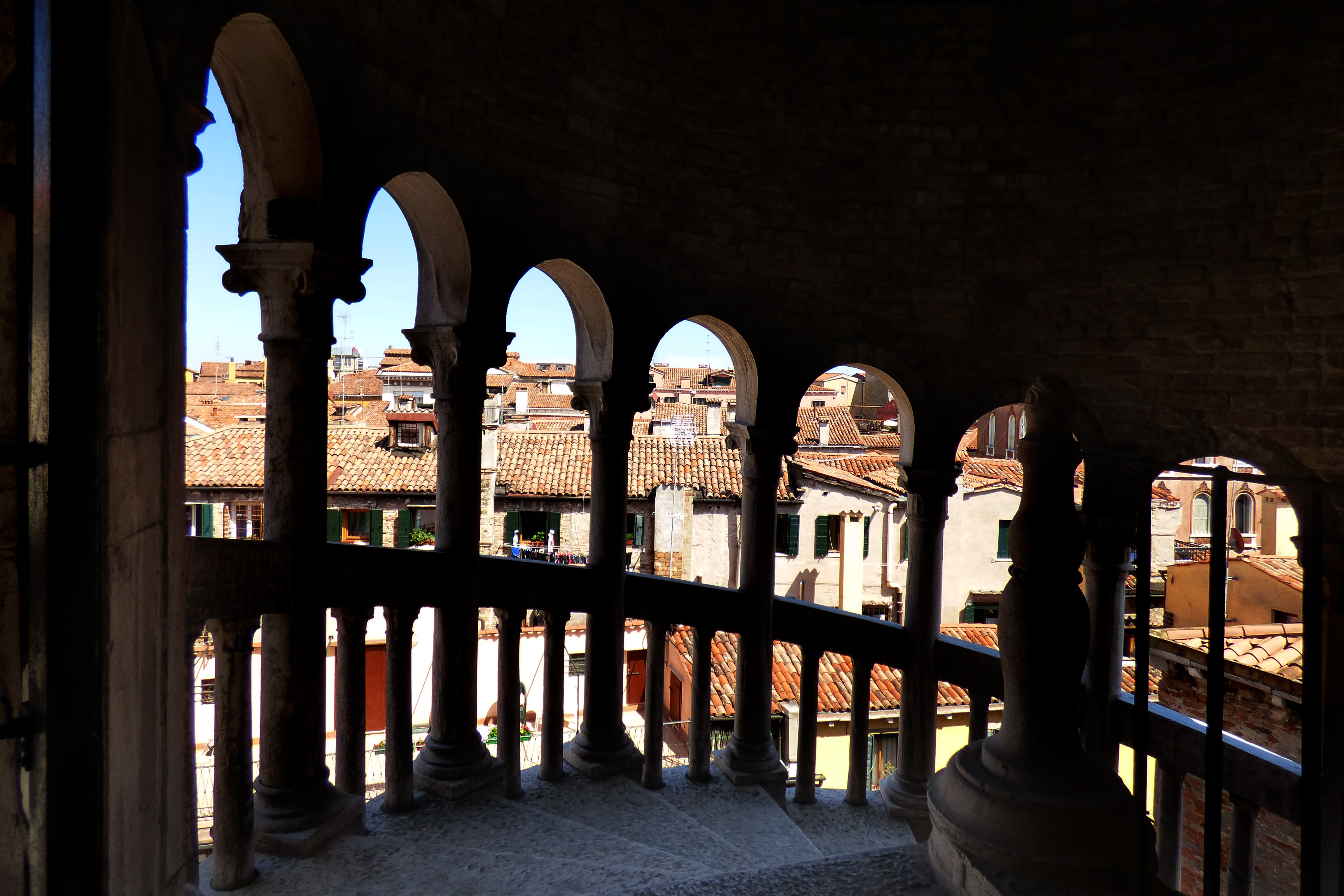 La scala a chiocciola del Palazzo Contarini, detta "Del Bovolo" vista dall'interno